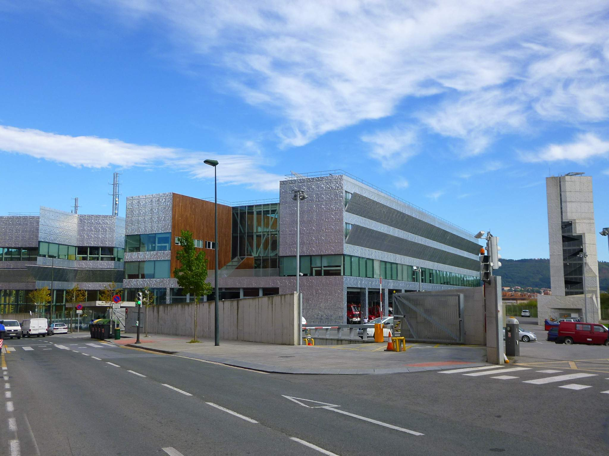 Parque de Bomberos y Policía Municipal de Bilbao, en el barrio de Miribilla